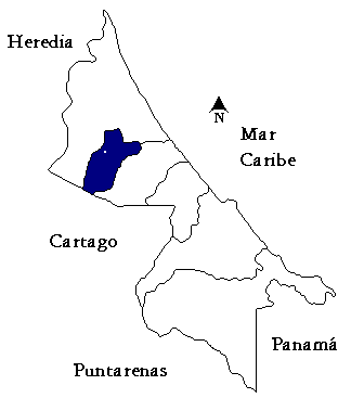 Mapa del cantón de Guácimo, provincia de Limón, Costa Rica